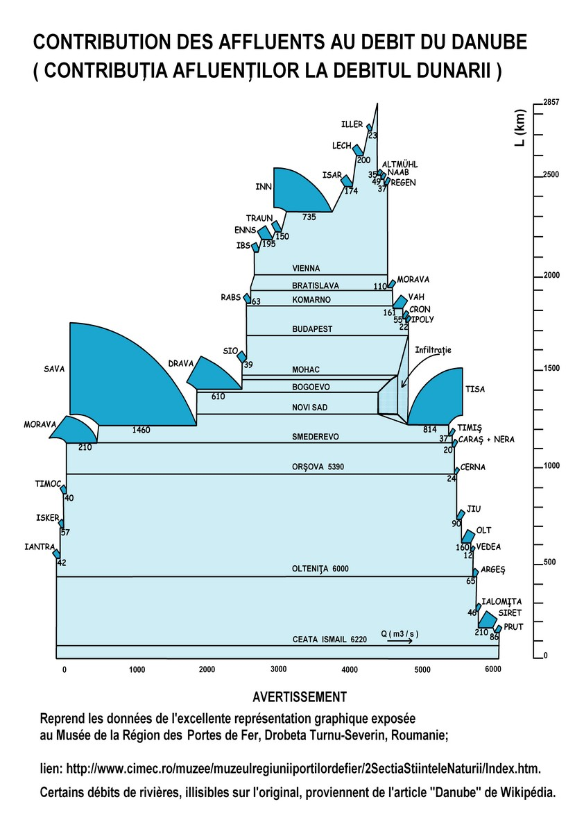 Contribution des affluents au débit du Danube